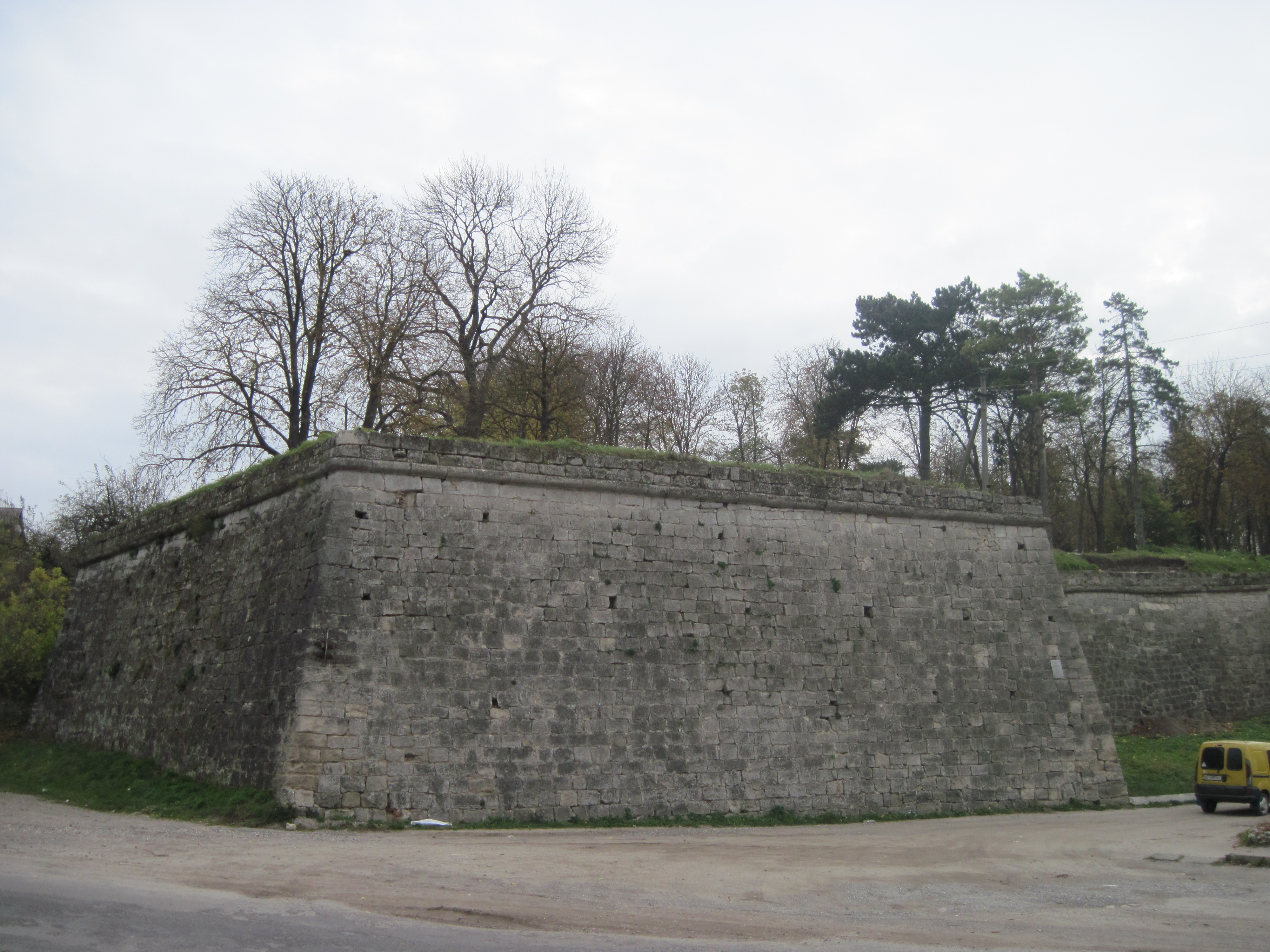 Збаразький замок 2